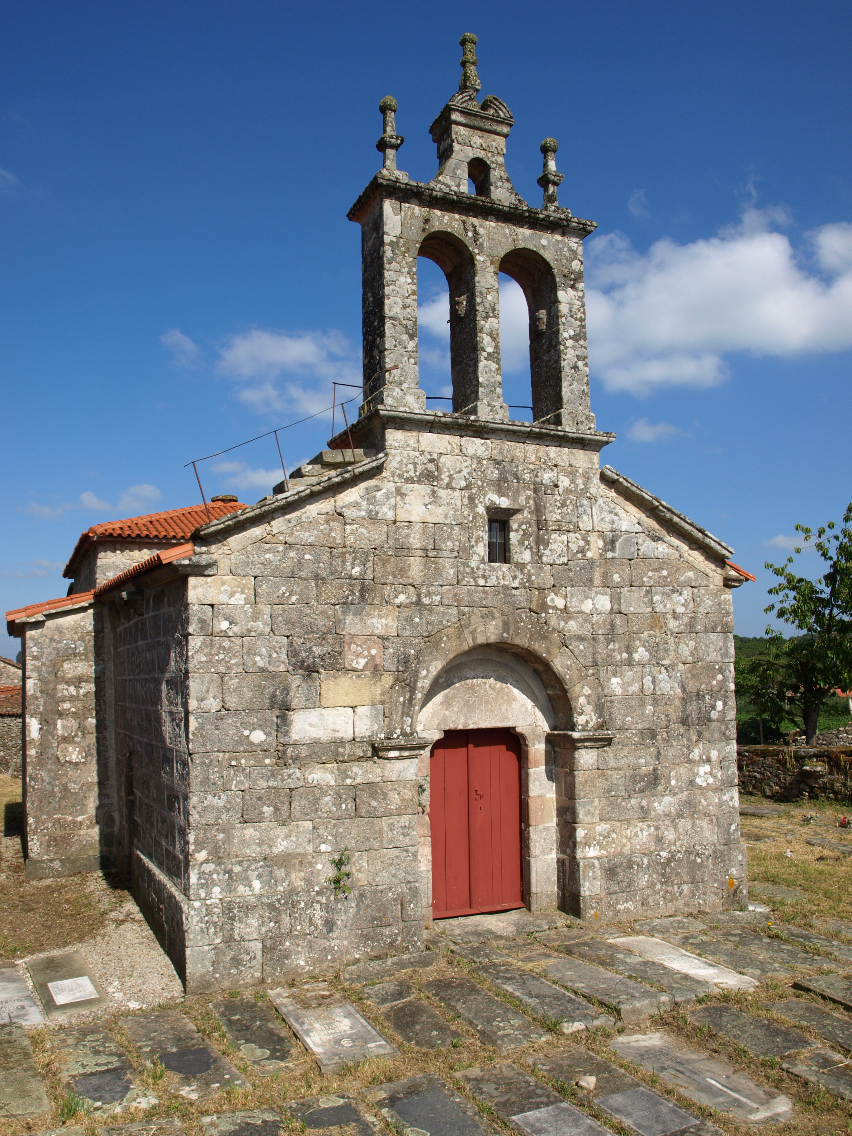 Antiga Igrexa de San Xoán de Antas